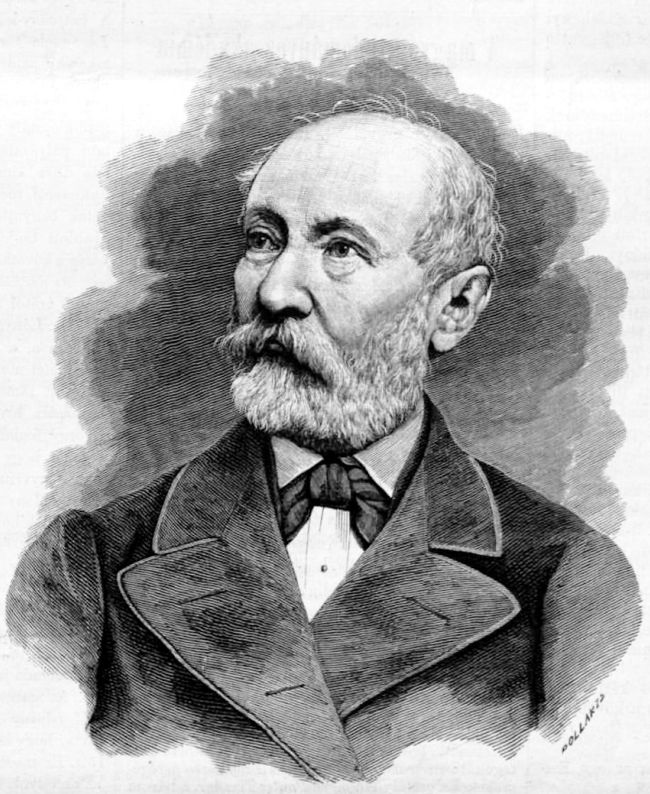 Engel József szobrász